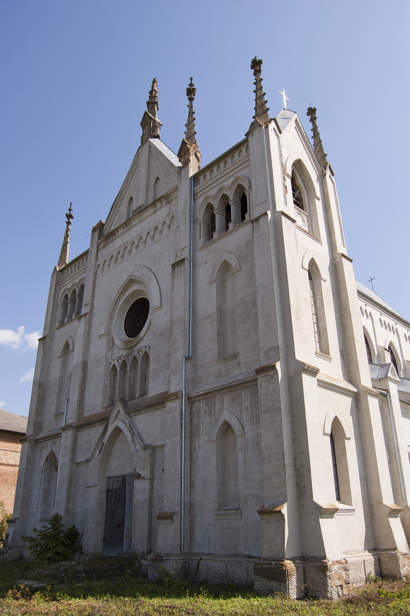 Костьол Св. Діви Марії, с. Краснопіль